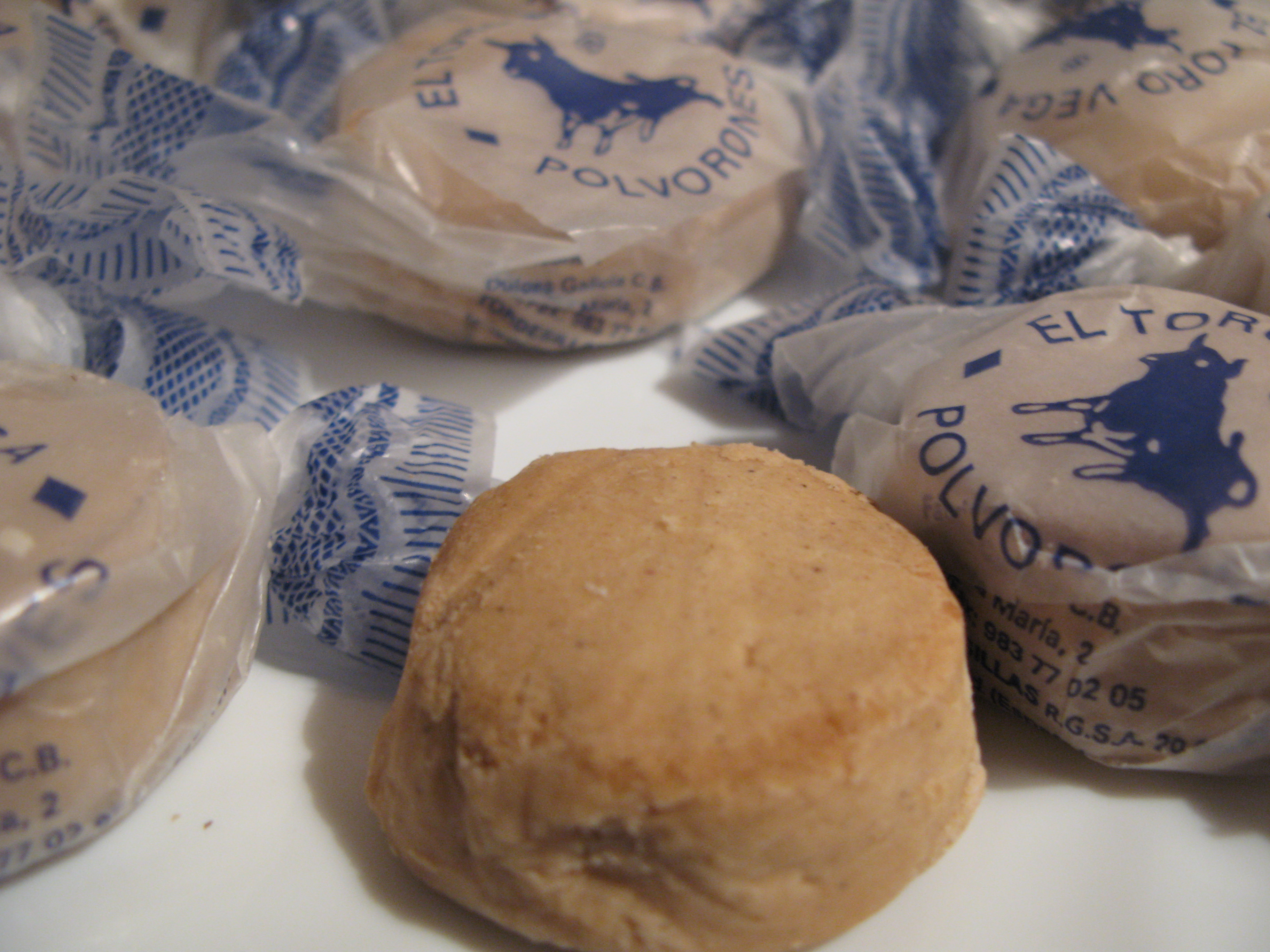 Polvorón de Tordesillas en la provincia de Valladolid (Castilla y León, España)